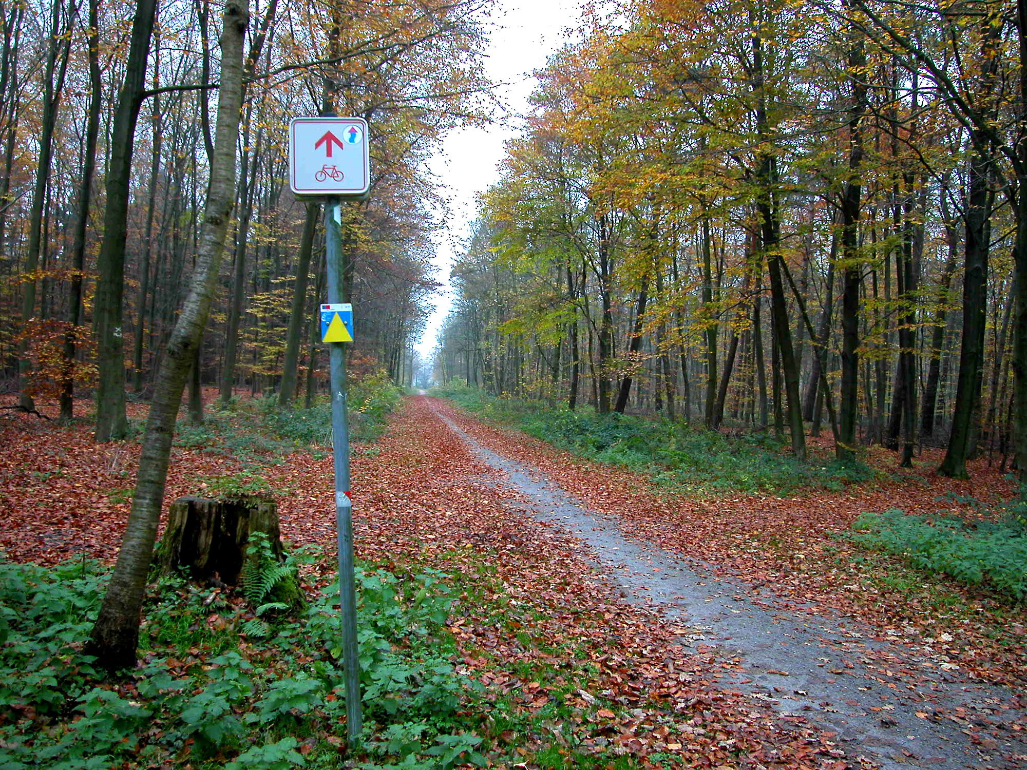 NiederRhein Fahrradroute, NRW, Deutschland